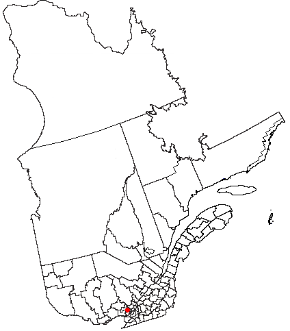 Volapük: Topam in provin: Québec.